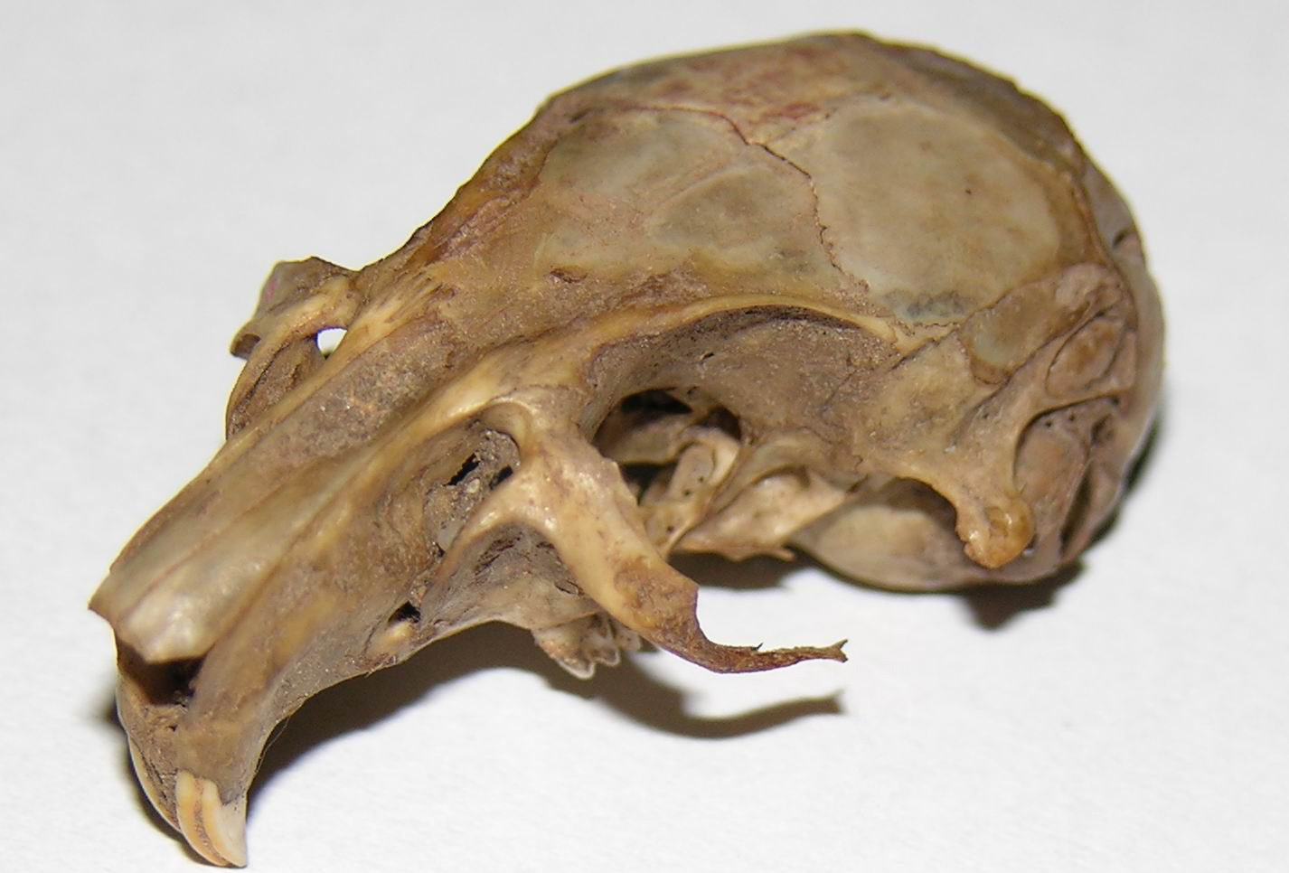 Mongolian gerbil skull